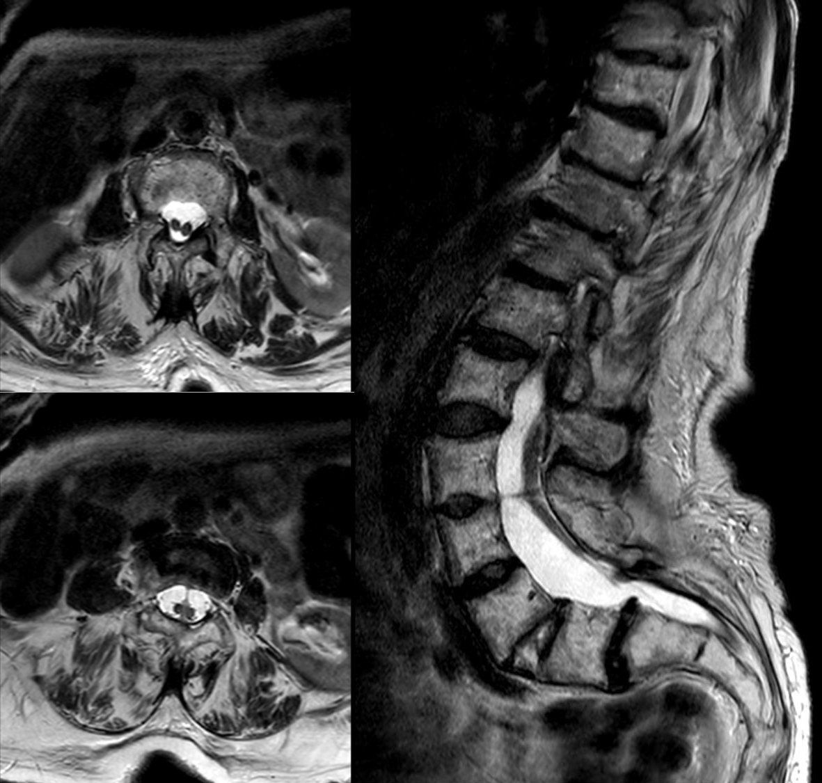 Magnetresonanztomographie (T2 axial und sagittal) einer Diastematomyelie. Der Befund war bei der 80-jährigen Frau bisher nicht bekannt. Leider können keine Angaben zu eventuellen Einschränkungen der Patientin gemacht werden. Aber offenbar kann man damit alt werden.